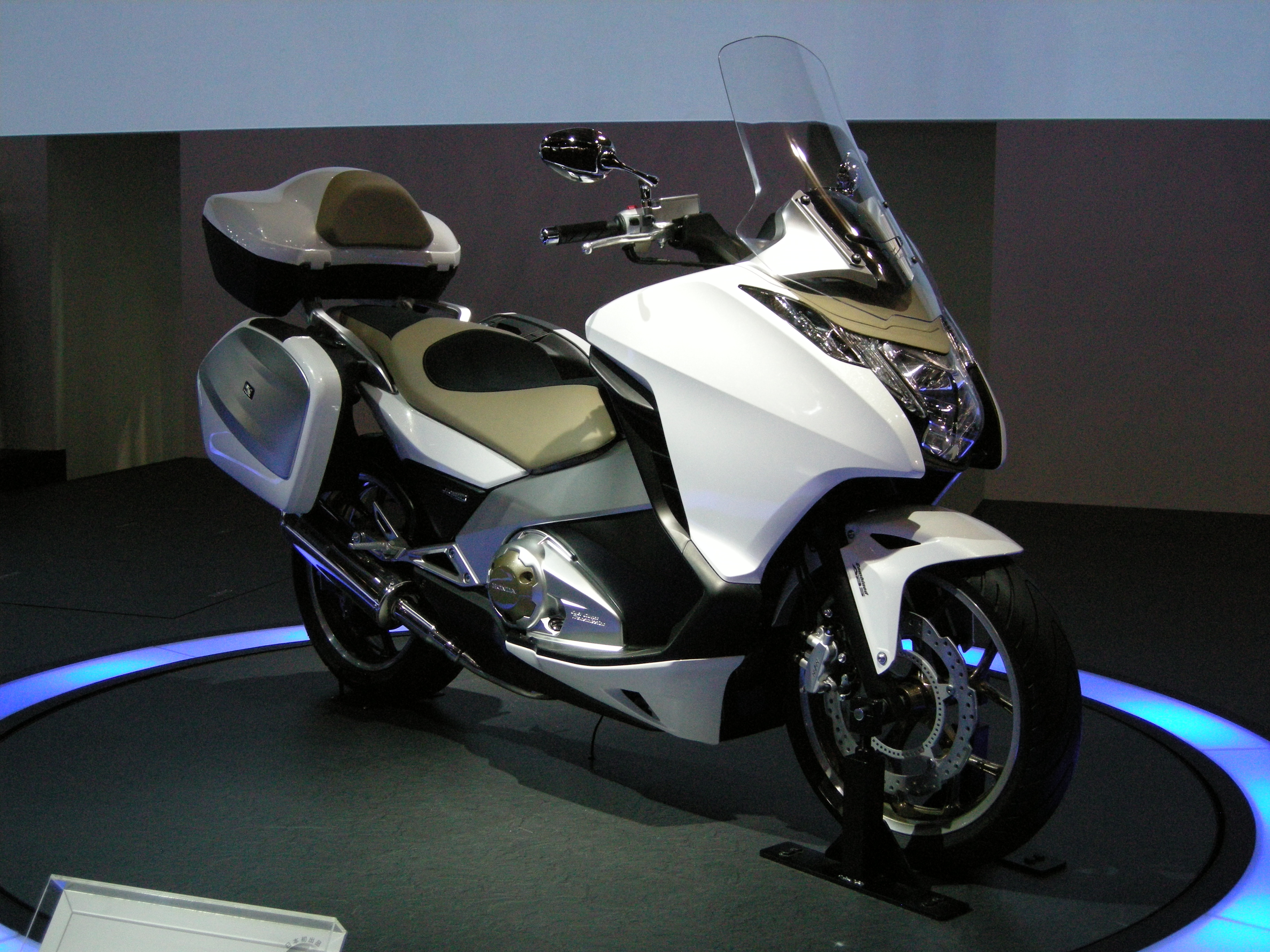 2011年東京モーターショーにて撮影